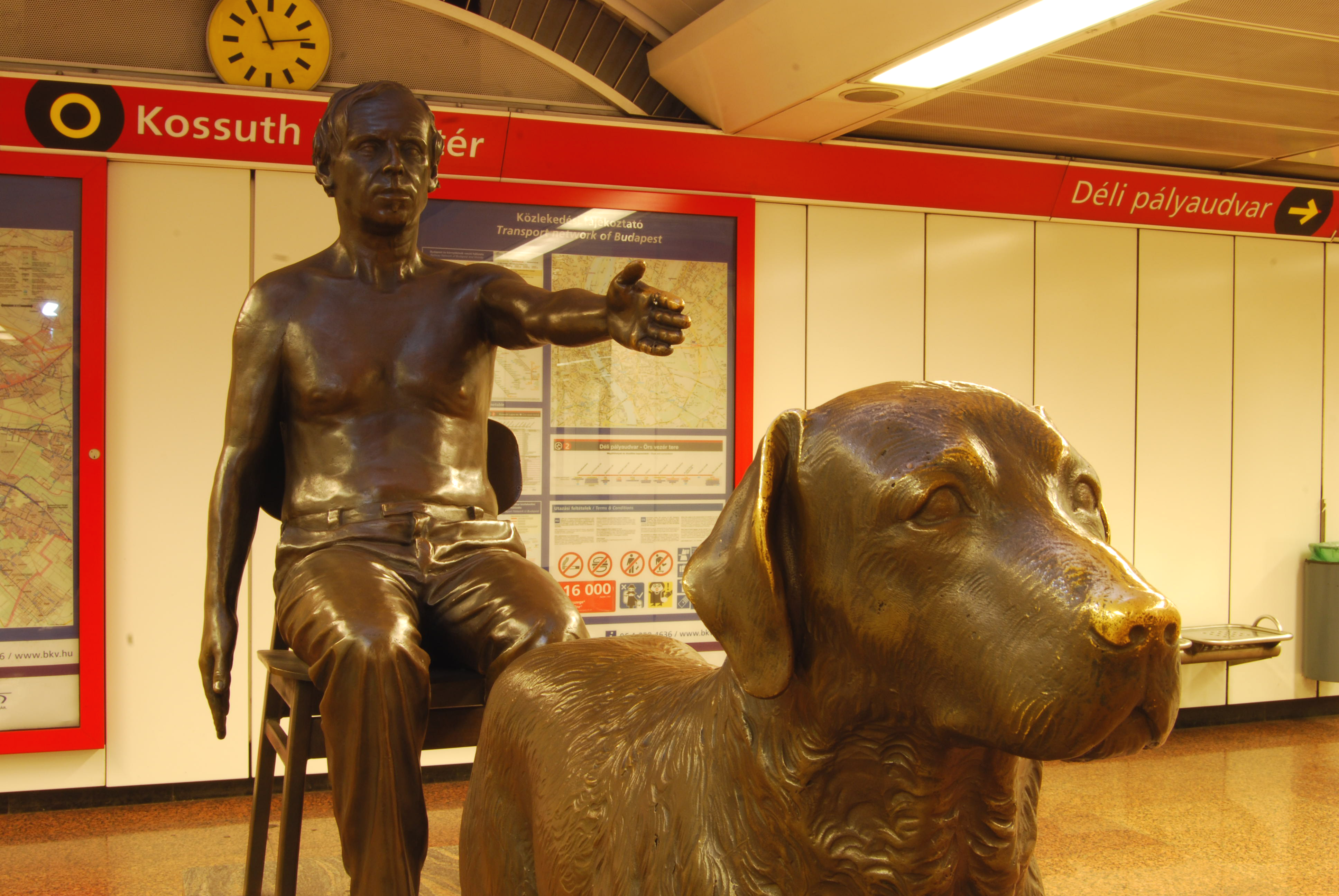 bronz, gránit